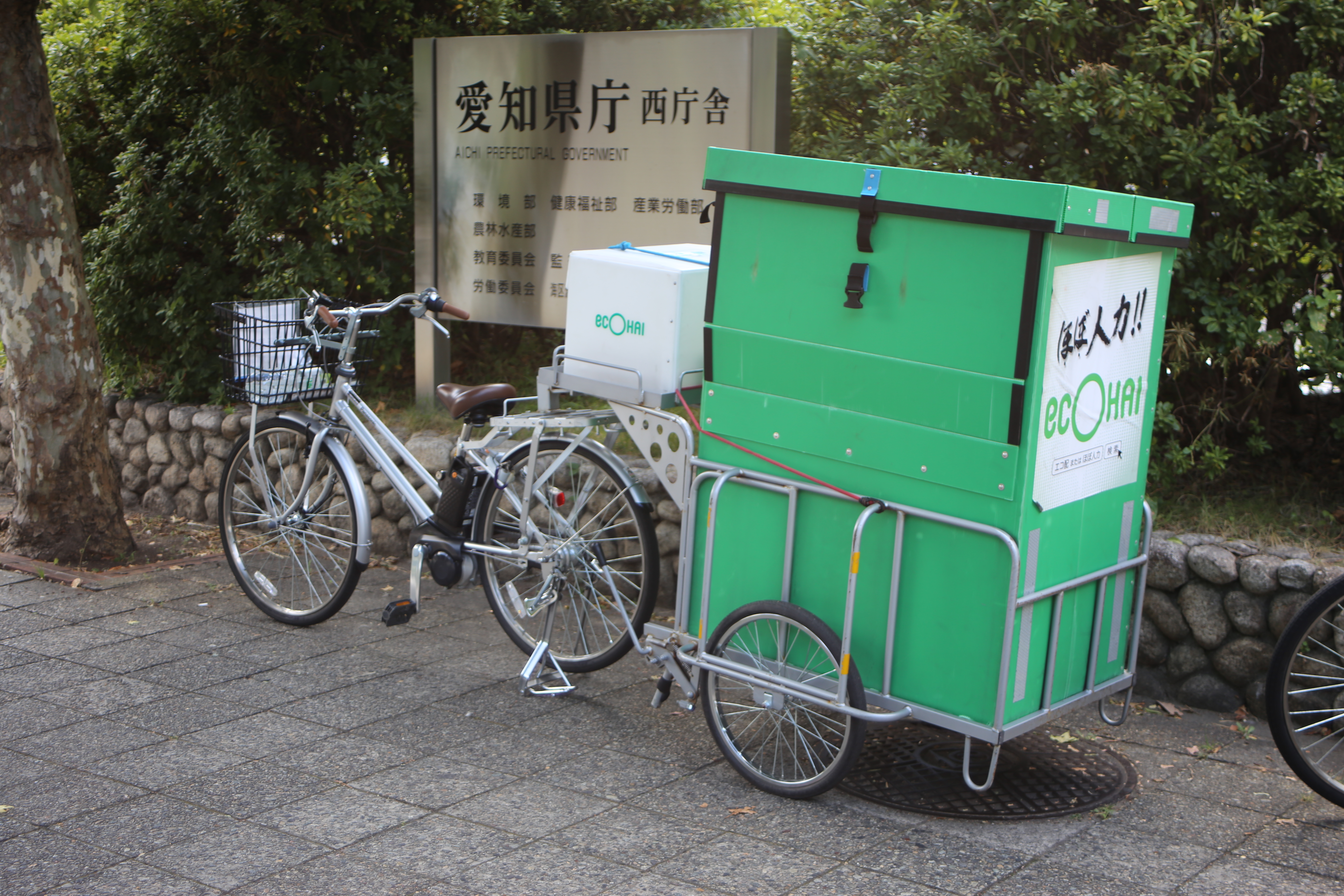 名古屋市中区三の丸三丁目の愛知県庁西庁舎前に駐輪中のエコ配の配達車